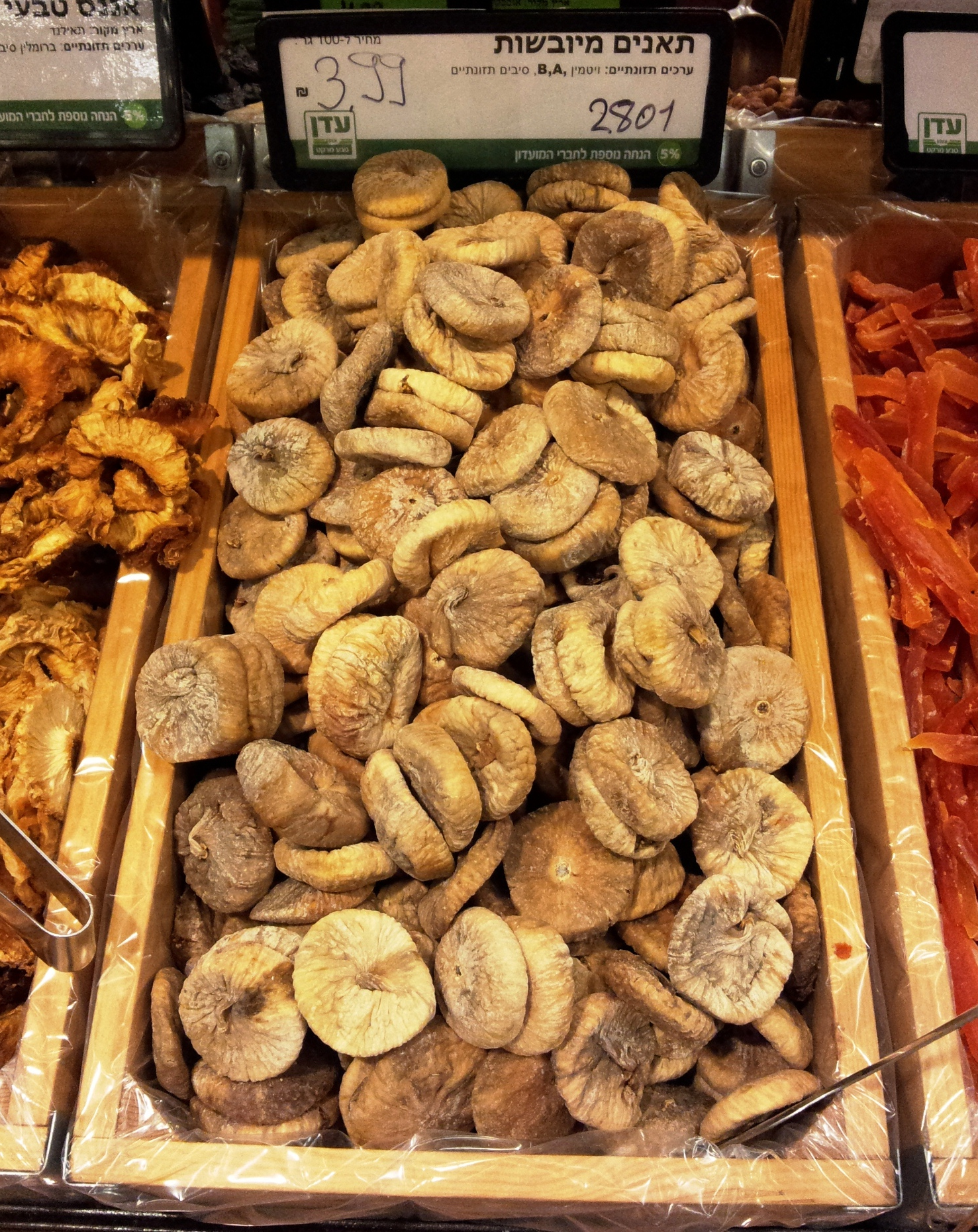 תאנים יבשות במרכול בירושלים